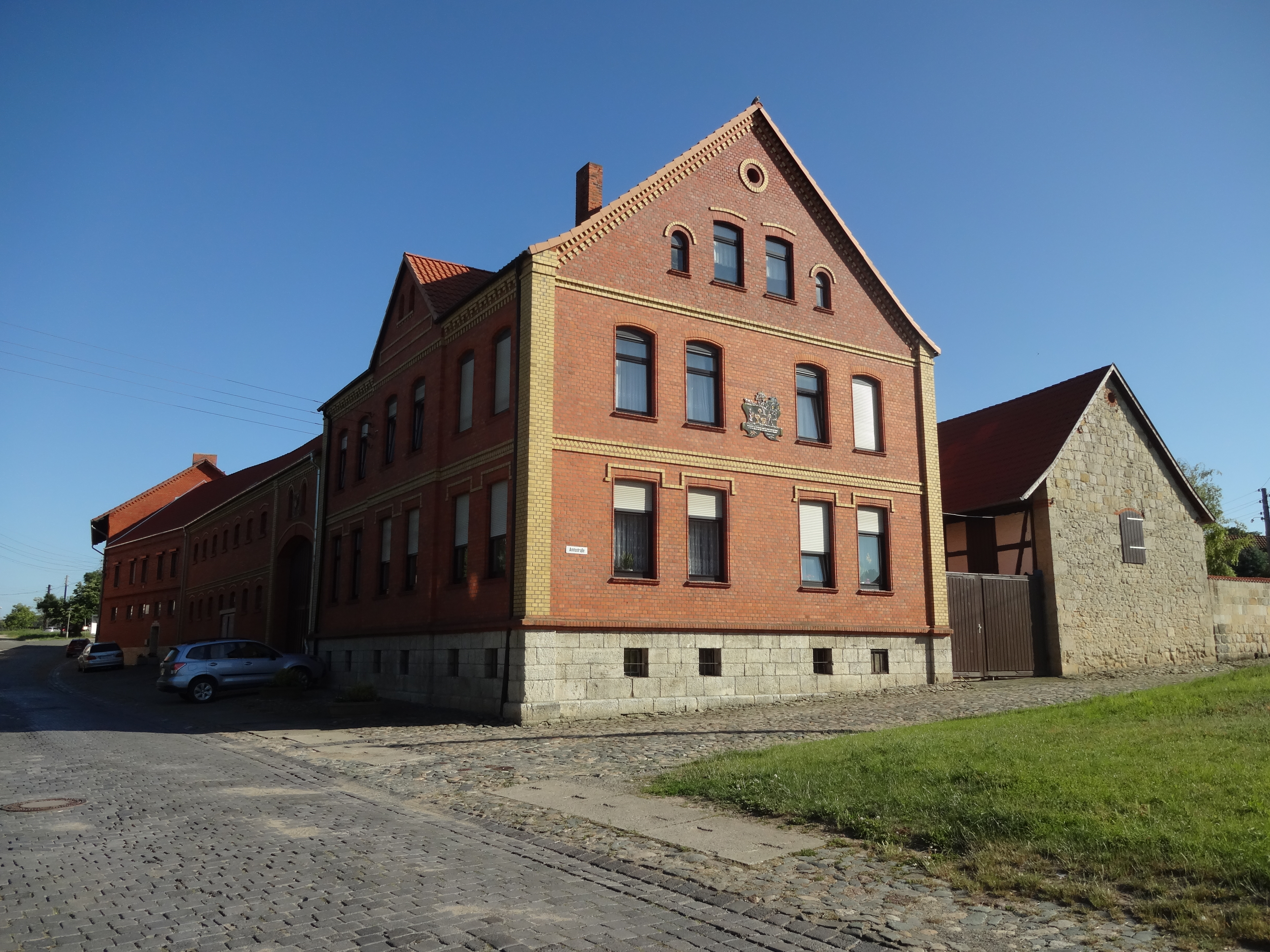 denkmalgeschützter Bauernhof in Amtsstraße 8 in Harsleben)